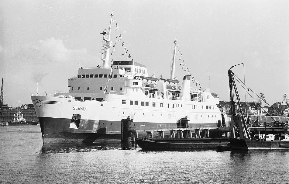 am Oslokai.